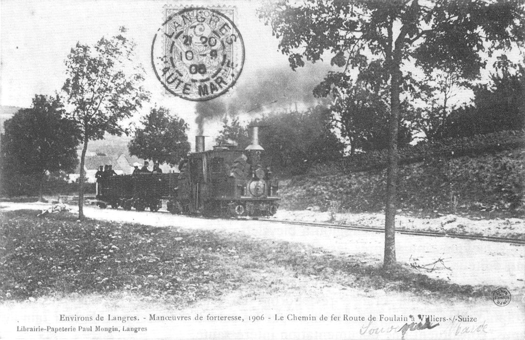 Carte postale ancienne Manœuvres de forteresse, chemin de fer route de Foulain à Villiers-sur-Suize, Haute-Marne, France